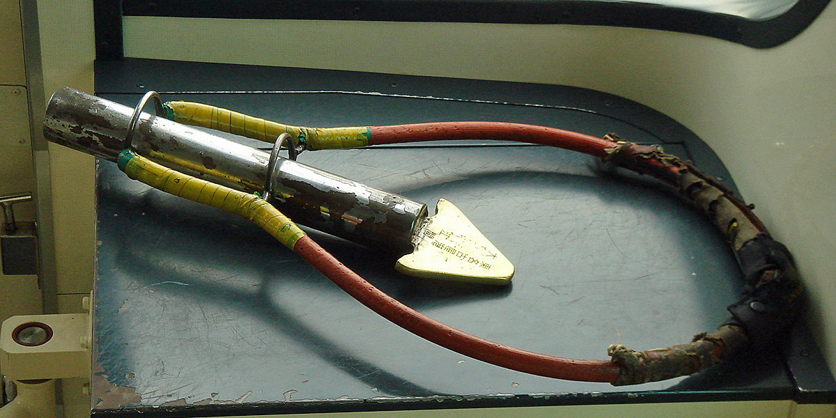 名鉄築港線で使われているスタフ